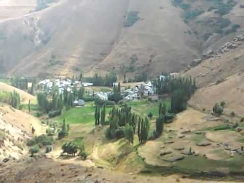 Büyükdere mahllesi